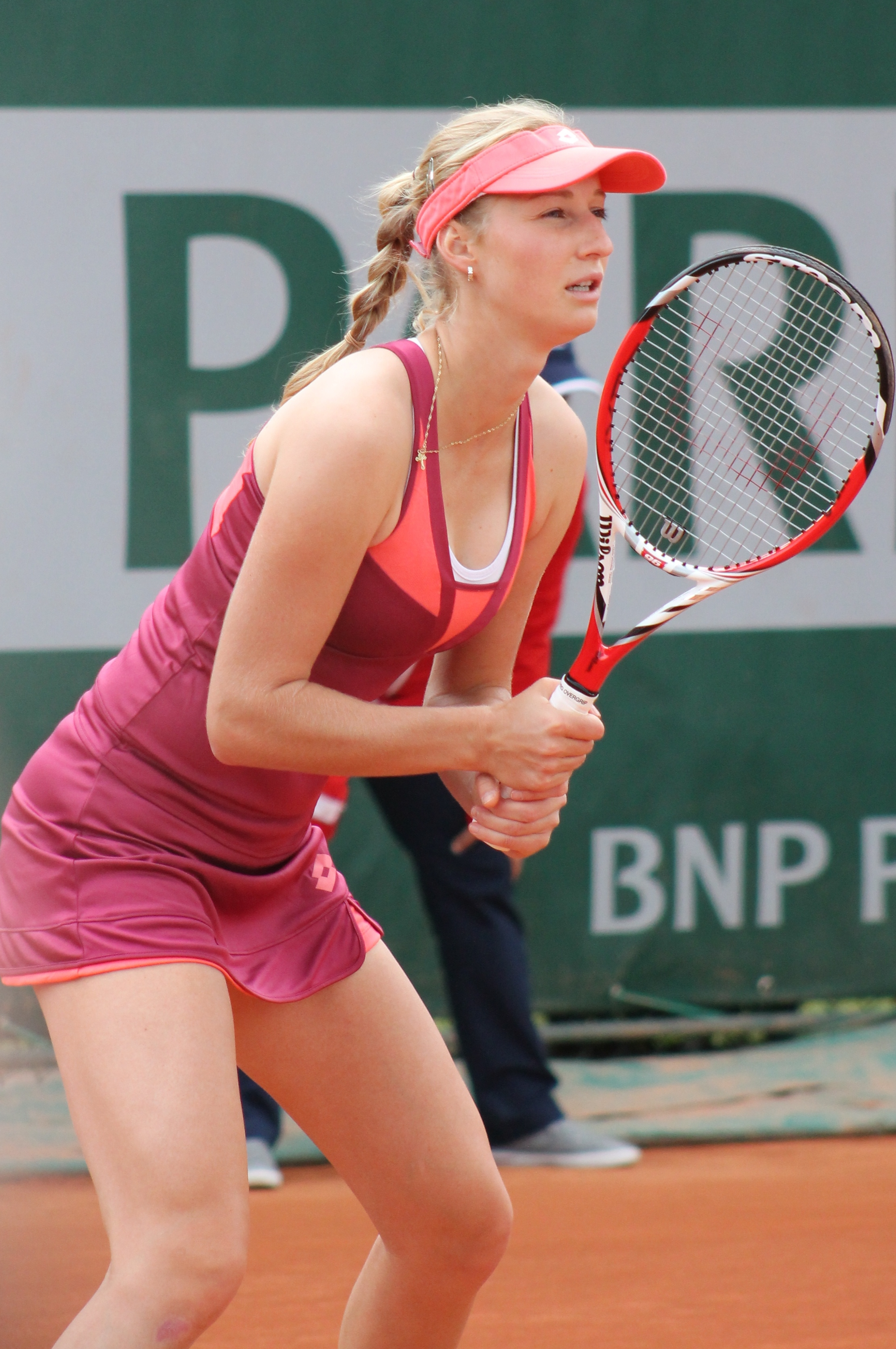 Ekaterina Makarova at 2013 Roland Garros